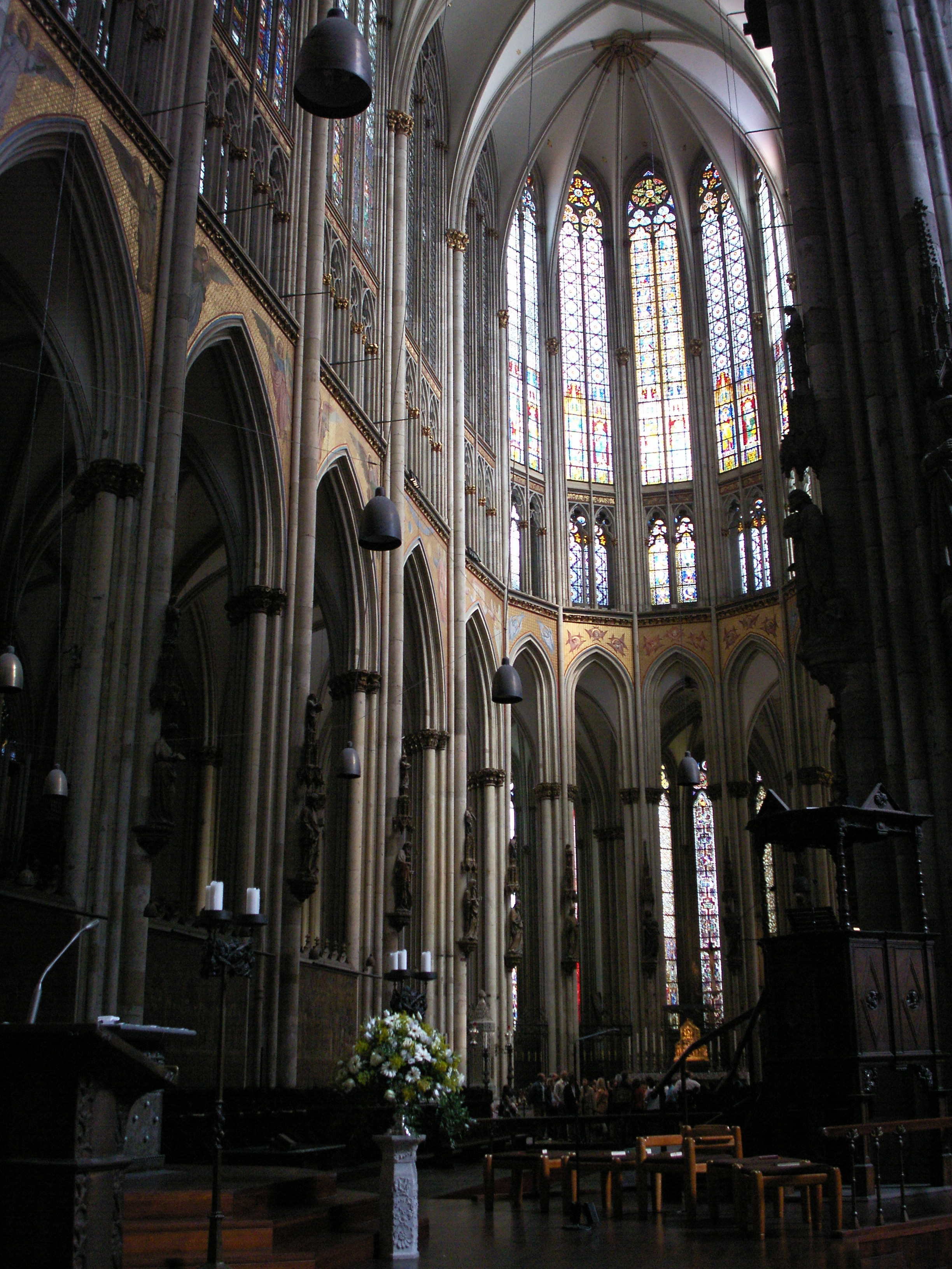 Kölner Dom, Inneres